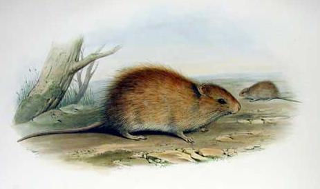 Rattus lutreolus (orig. Mus vellerosus)